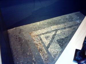 Mosaico del suelo de los baños